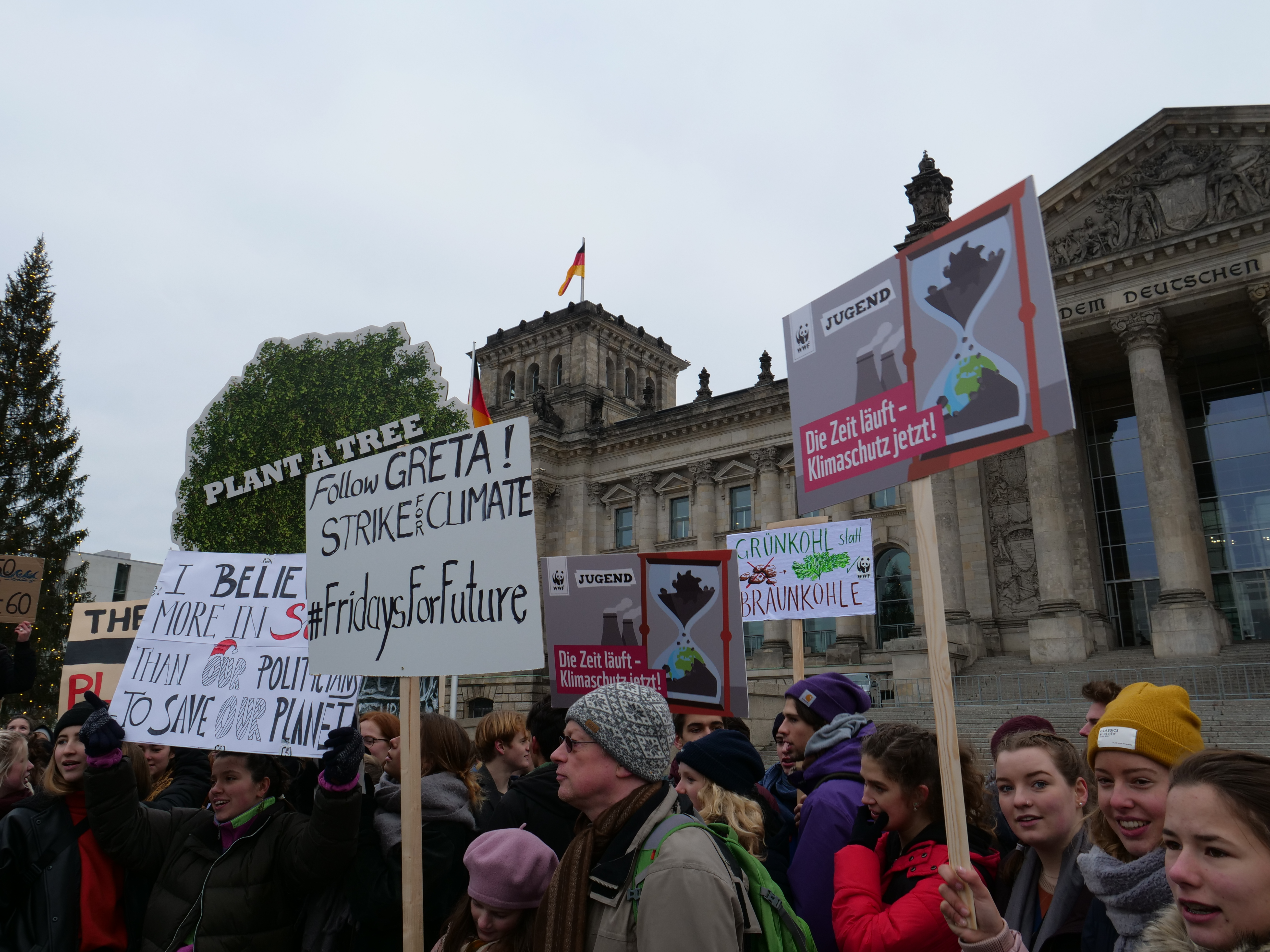 Unter dem Motto "#FridaysForFuture" und "Climate Strike!" streikten insbesondere Schülerinnen und Schüler vor dem Reichstagsgebäude in Berlin.